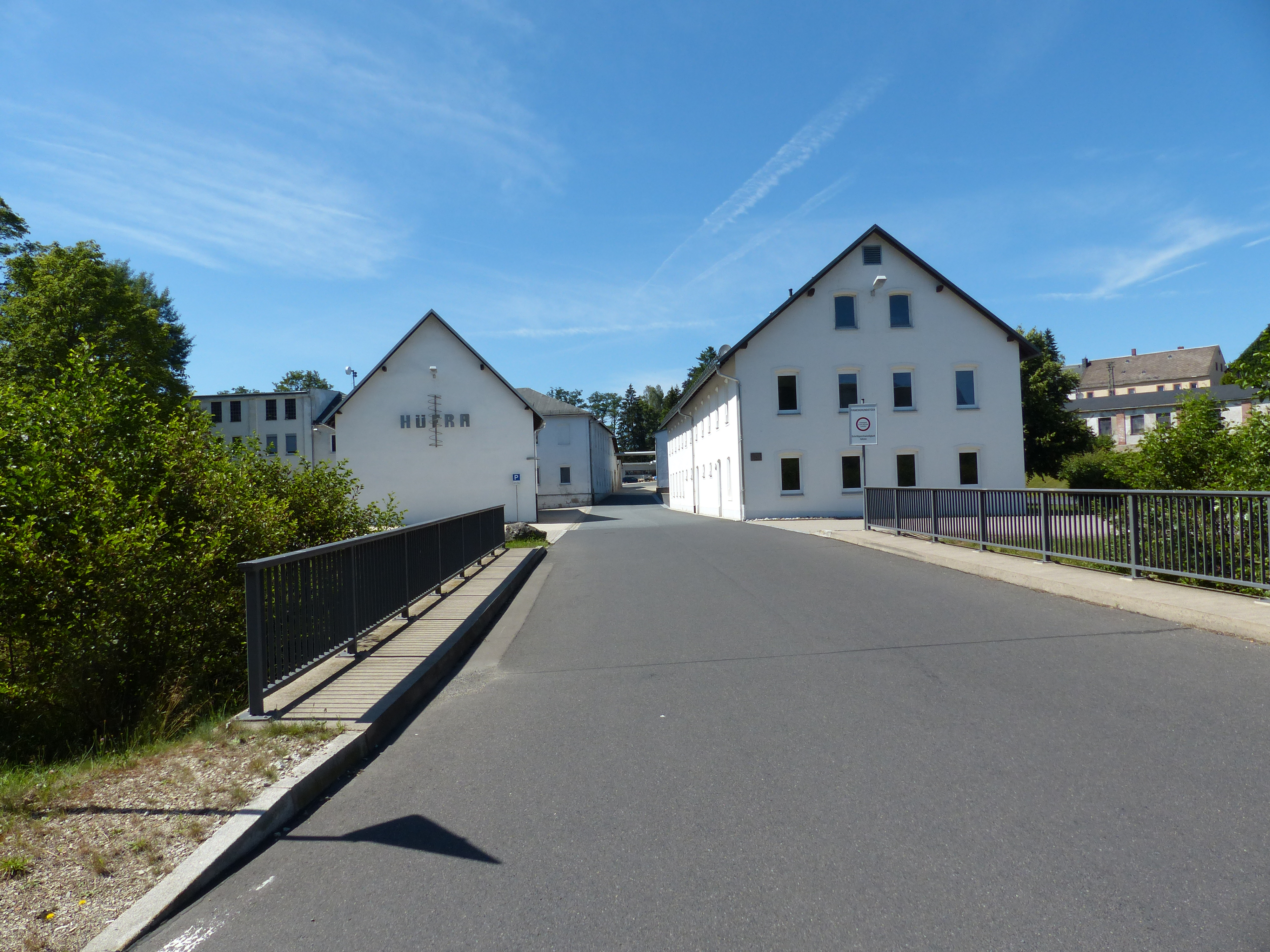 Franken, Ortsteil von Weißenstadt